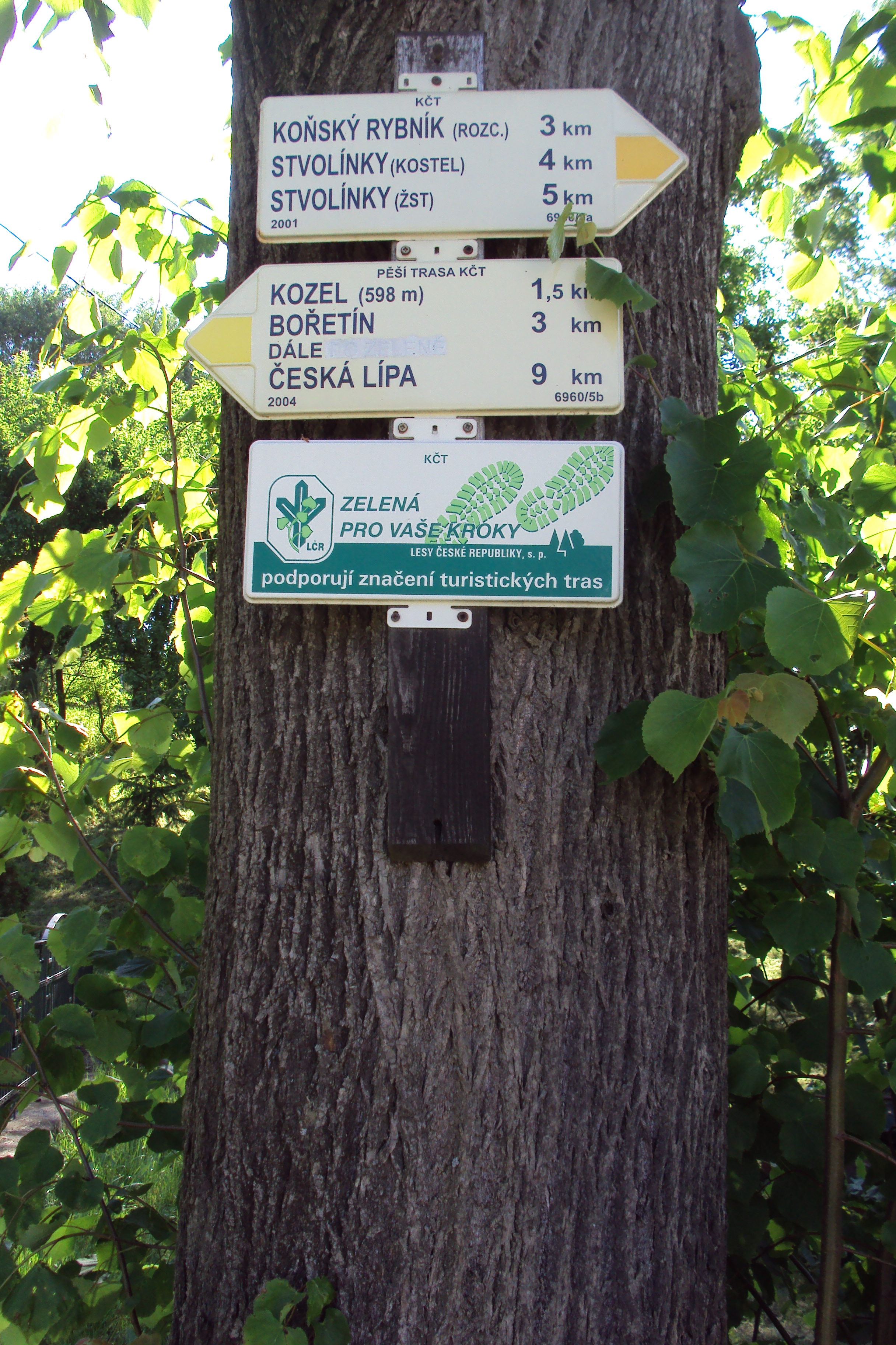 Rozcestník v obci Kozly na Českolipsku